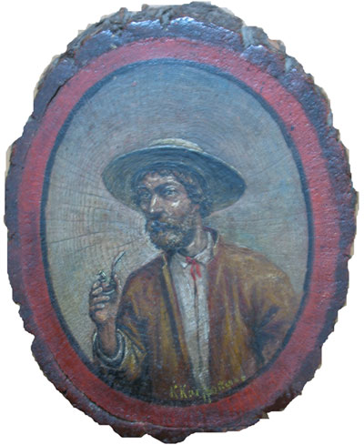 Беларуская (тарашкевіца): Малюнак беларускага паэта і празаіка Каруся Каганца (Казімера Кастравіцкага) «Тып беларуса» (алей)